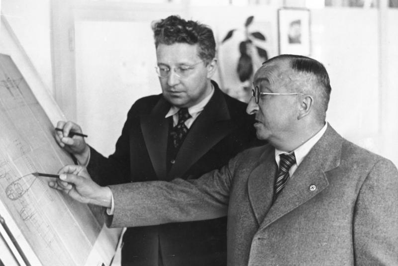 ADN-ZB/ Archiv II. Weltkrieg 1939-45 Rüstungsindustrie im faschistischen Deutschland, Juli 1941 Der Flugzeugkonstrukteur Prof. Ernst Heinkel (r.) überprüft und verändert die Konstruktionszeichnung eines Mitarbeiters. [Scherl Bilderdienst]